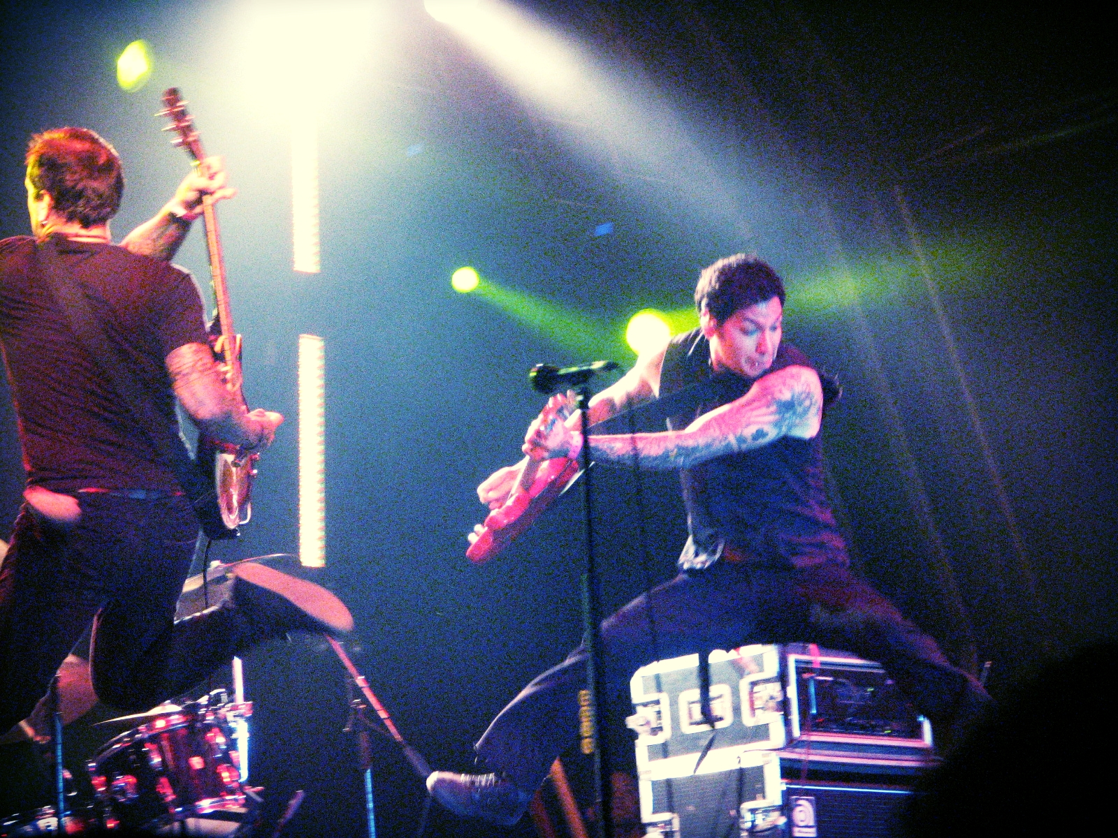 mxpx at Greenbelt2008